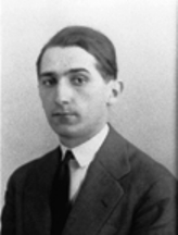 Mario Pedrosa em 1920